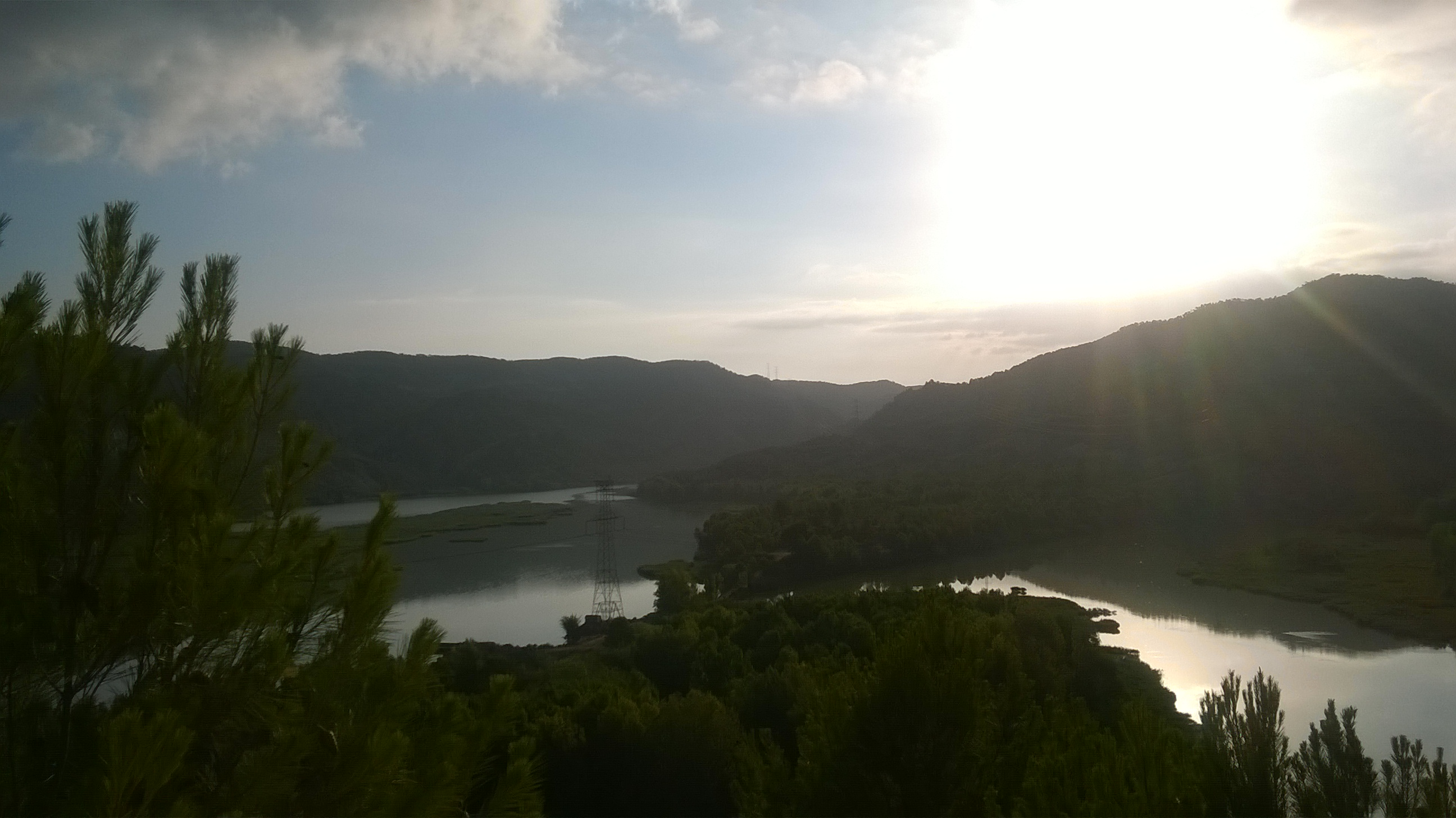 Vistas de Cofrentes tomadas durante el verano de 2014 por Isabel Valiente de la Granja.